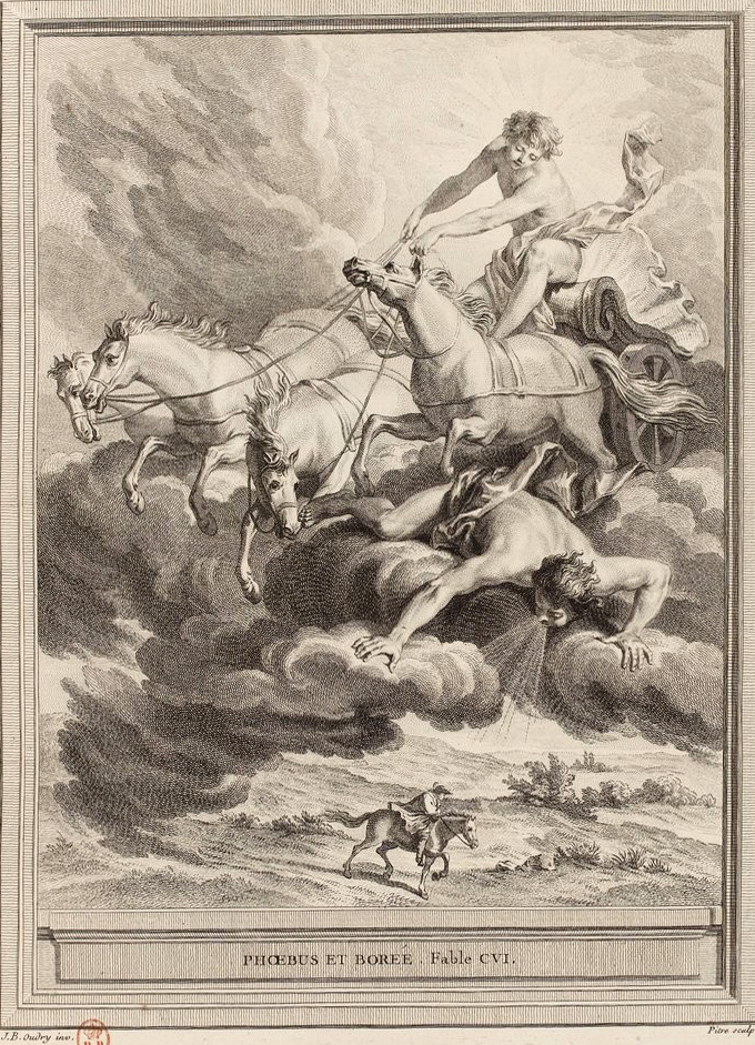 Gravure réalisée par Pieter Franciscus Martenisie d'après un dessin de Jean-Baptiste Oudry représentant la fable Phébus et borée de Jean de La Fontaine (fable 3 du livre VI). Cette gravure est parue dans l'édition complète des fables de La Fontaine, parue en quatre tomes chez l'éditeur Desaint & Saillant, rue saint Jean de Beauvais à Paris, 1755-1759.